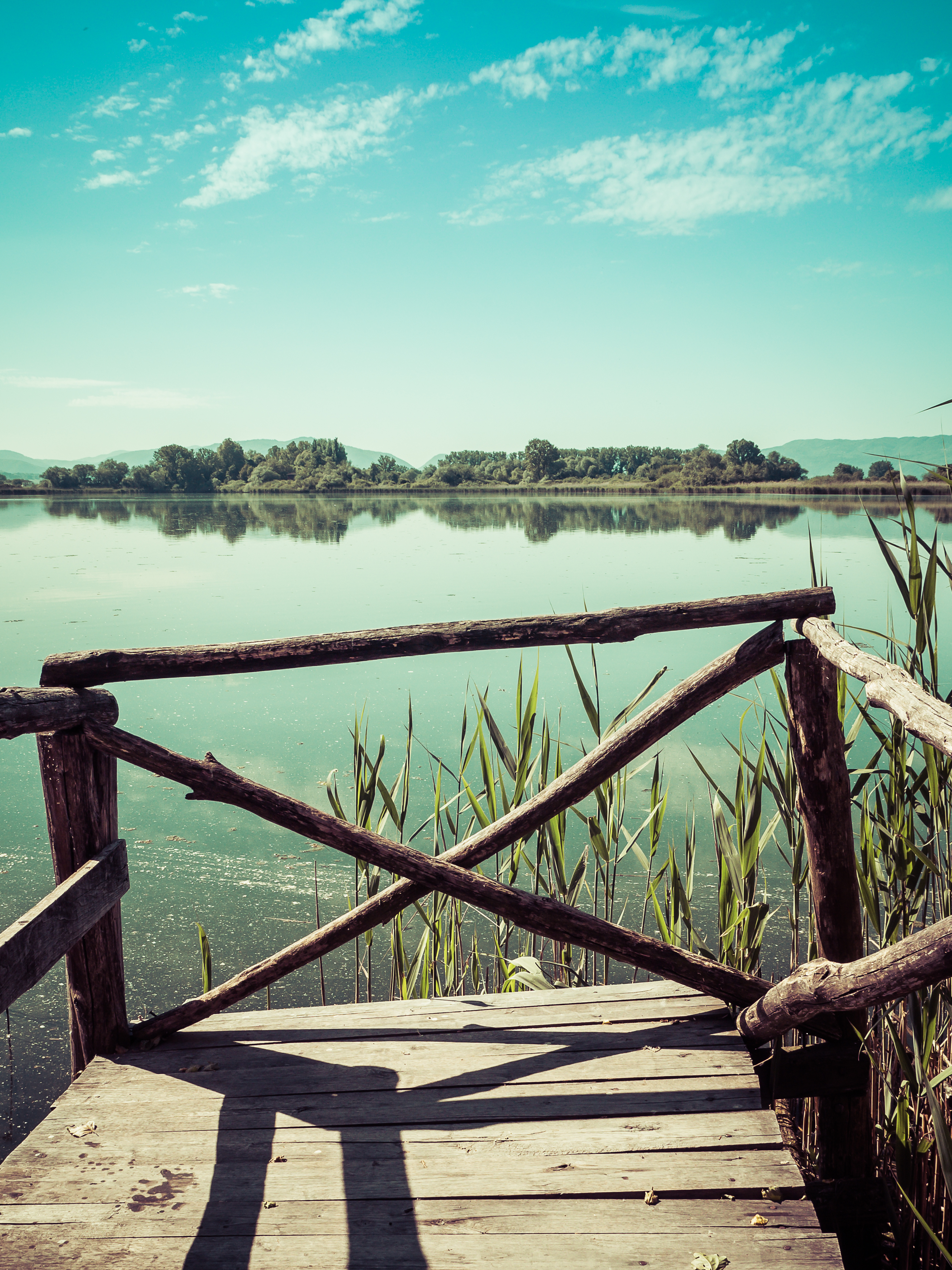 Riserva naturale Laghi Lungo e Ripasottile This is a photo of a monument which is part of cultural heritage of Italy.